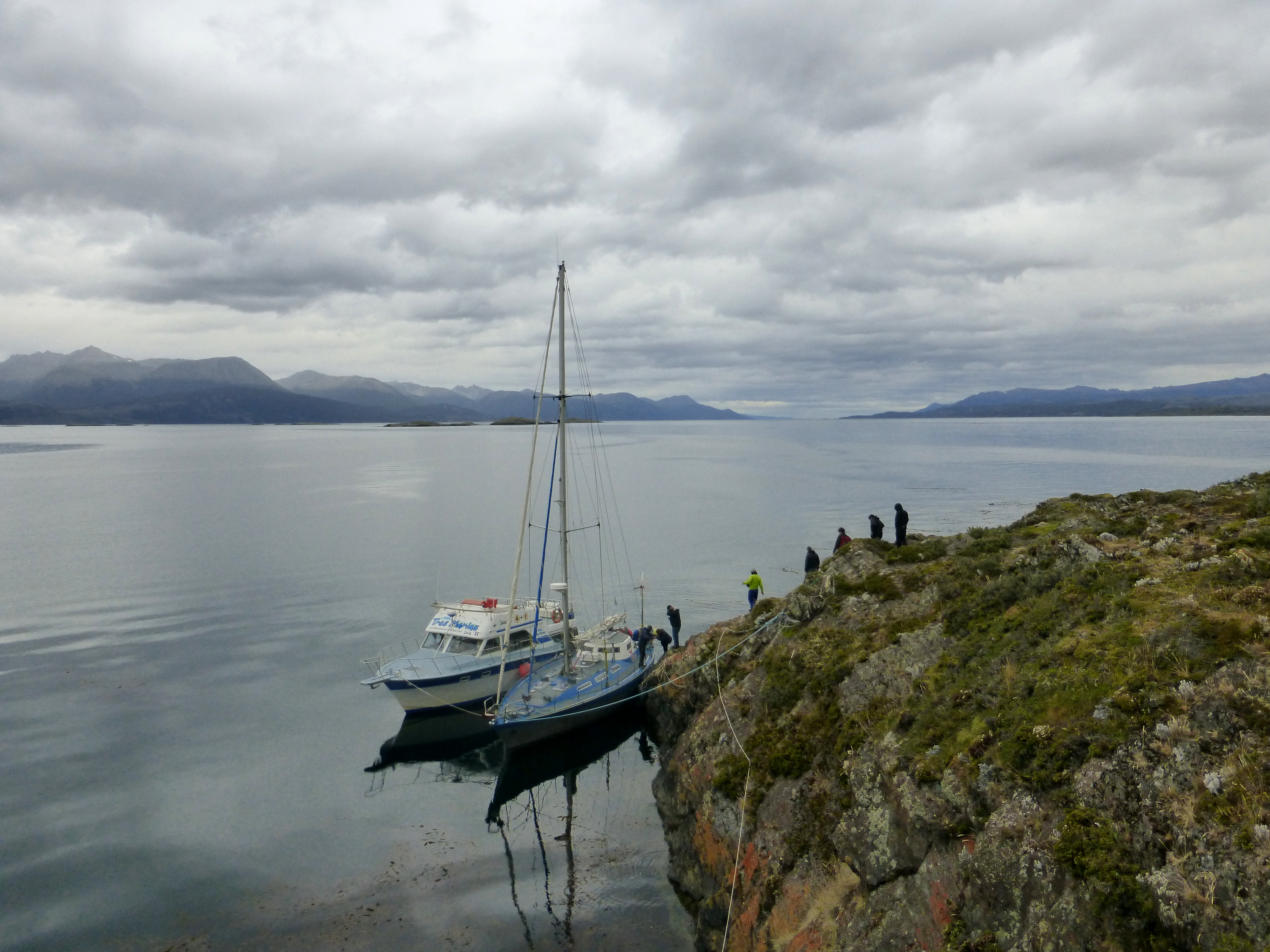 Barcos amarrados en la Isla H, sobre el Canal de Beagle, Ushuaia, Argentina.